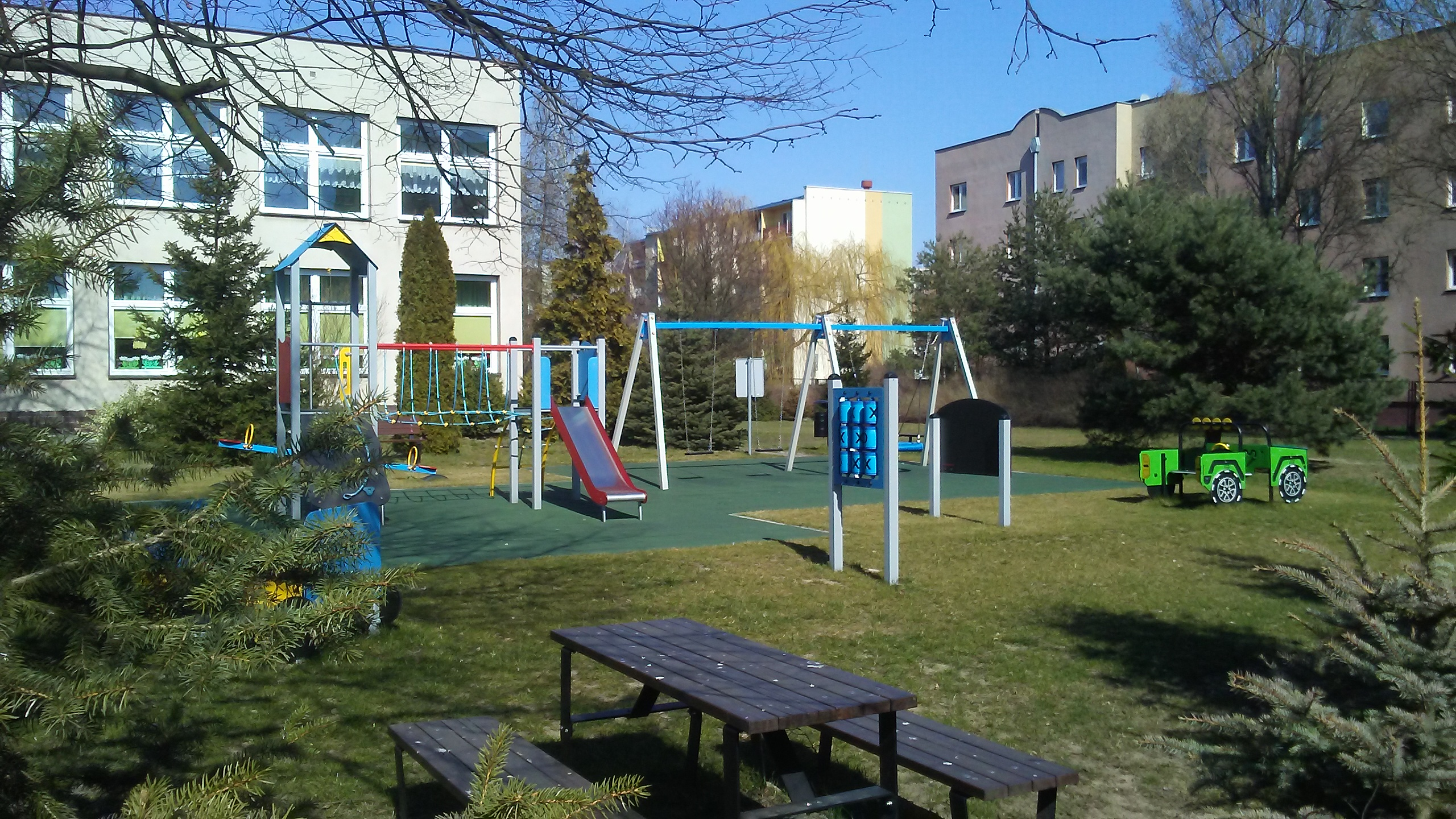 Przedszkole przy ulicy Leona Maya w Tomaszowie Mazowieckim